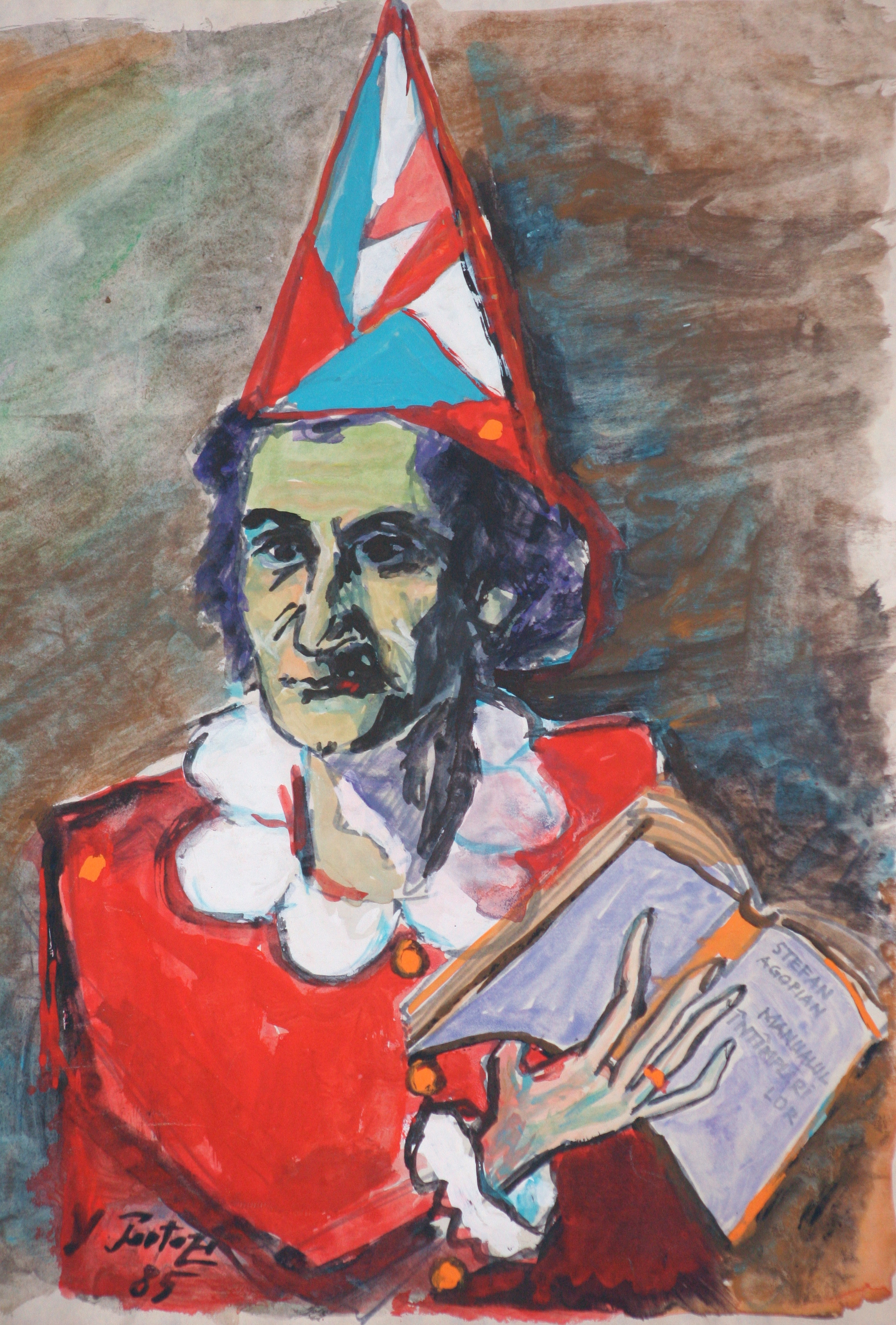 Portretul prozatorului Ştefan Agopian, făcut de către pictorul şi poetul Valeriu Pantazi. 1980